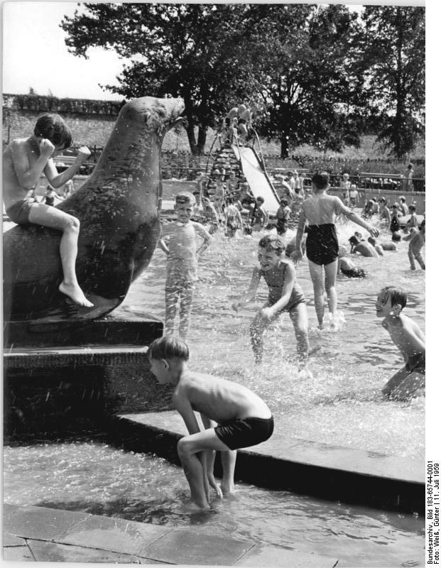 Berlin, Planschbecken Falkplatz Zentralbild Weiß 11.7.1959 Hochbetrieb im Planschbecken So ist es auszuhalten, wenn die Quecksilbersäule auf 35 Grad C steht. (Planschbecken Falkplatz im Bezirk Prenzlauer Berg)